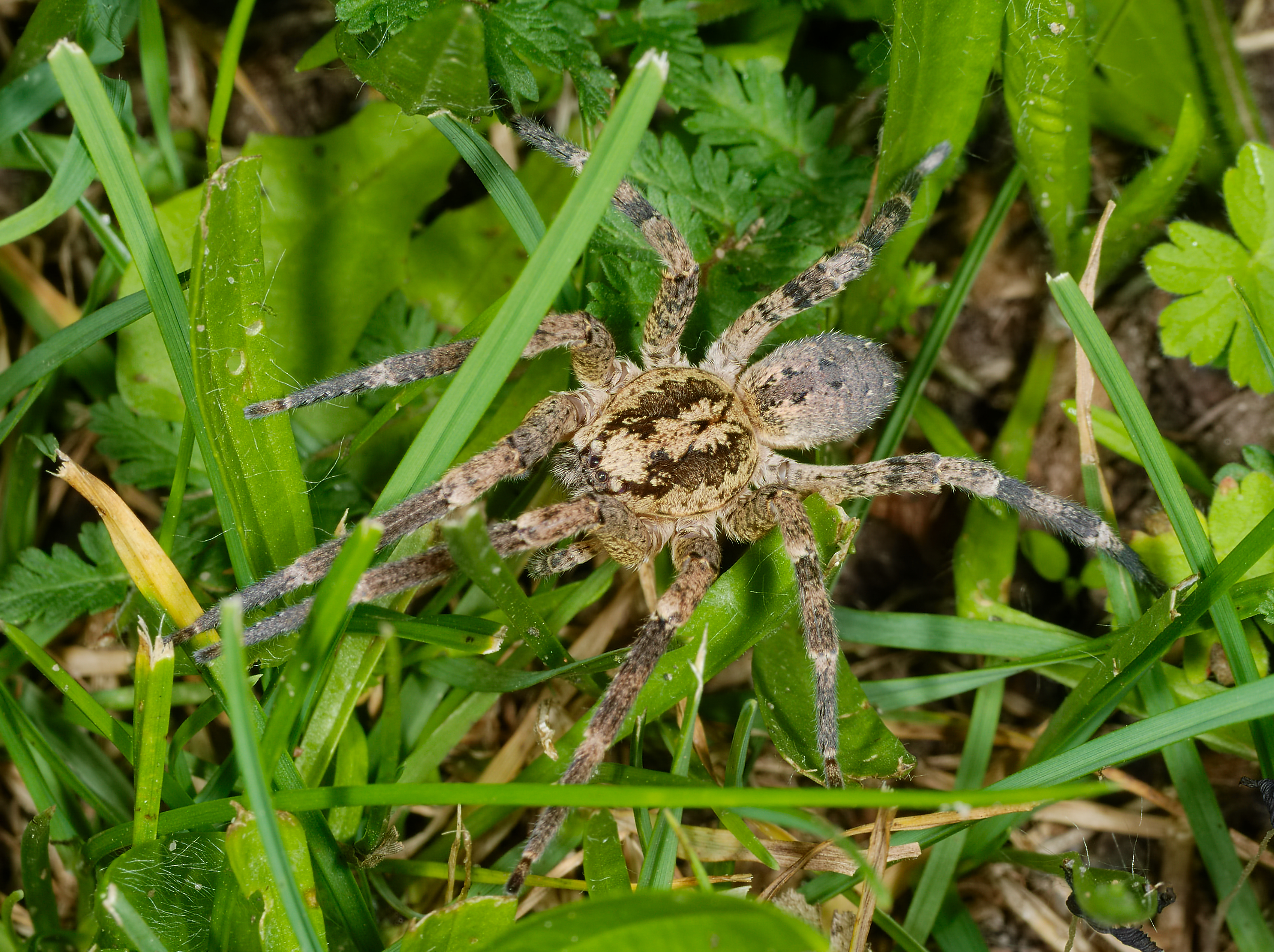 Kräuseljagdspinne - Zoropsis spinimana, Weibchen. Aufgenommen in Mannheim-Vogelstang, Baden-Württemberg, Deutschland.